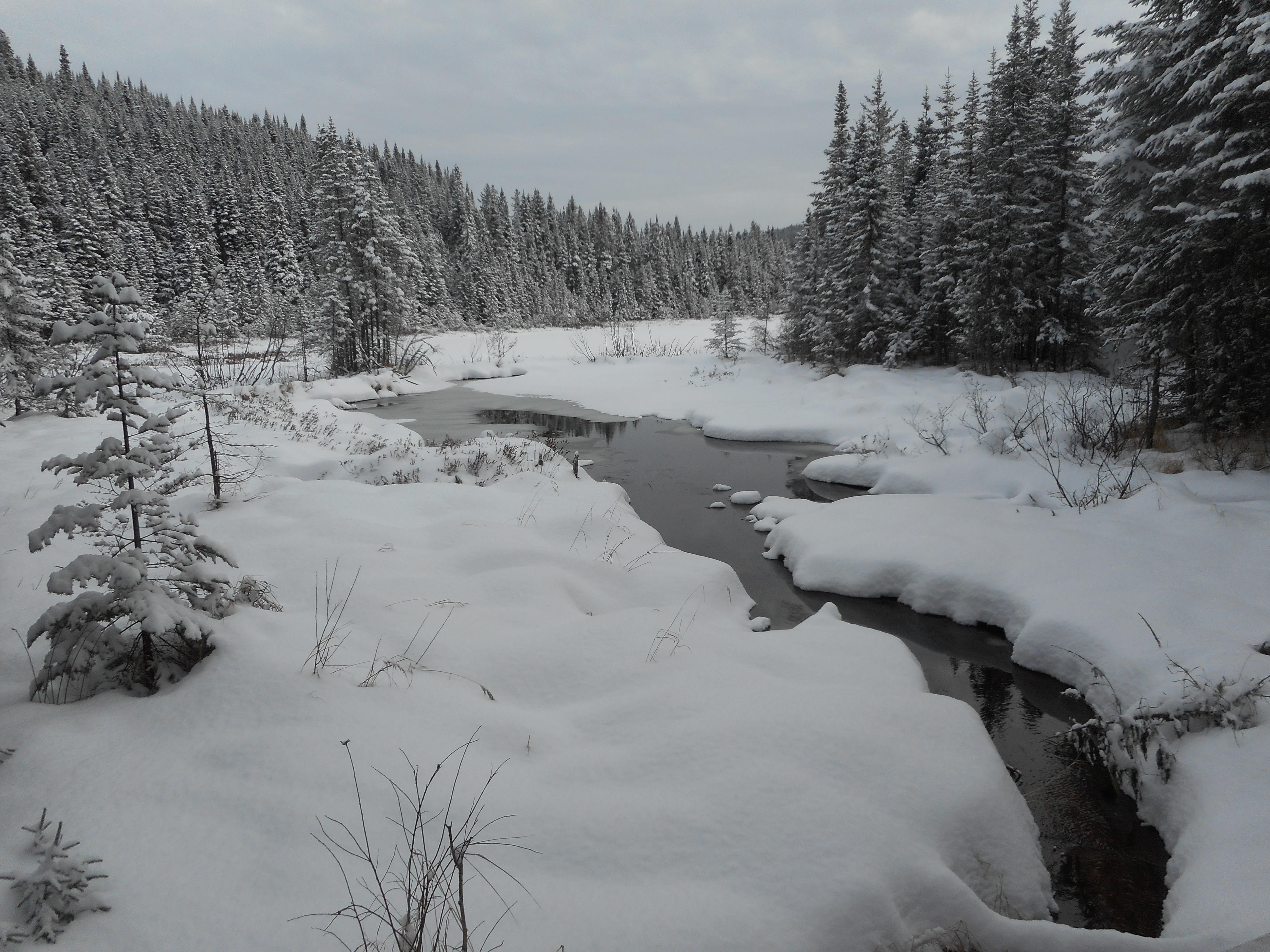 Forêt Montmorency, Québec